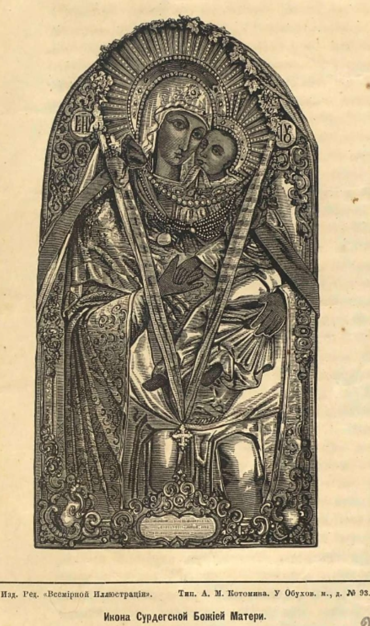 Сурдегская Икона Божией Матери ("Сургетский Свято-Духовский монастырь", С.- Пб., 1873)